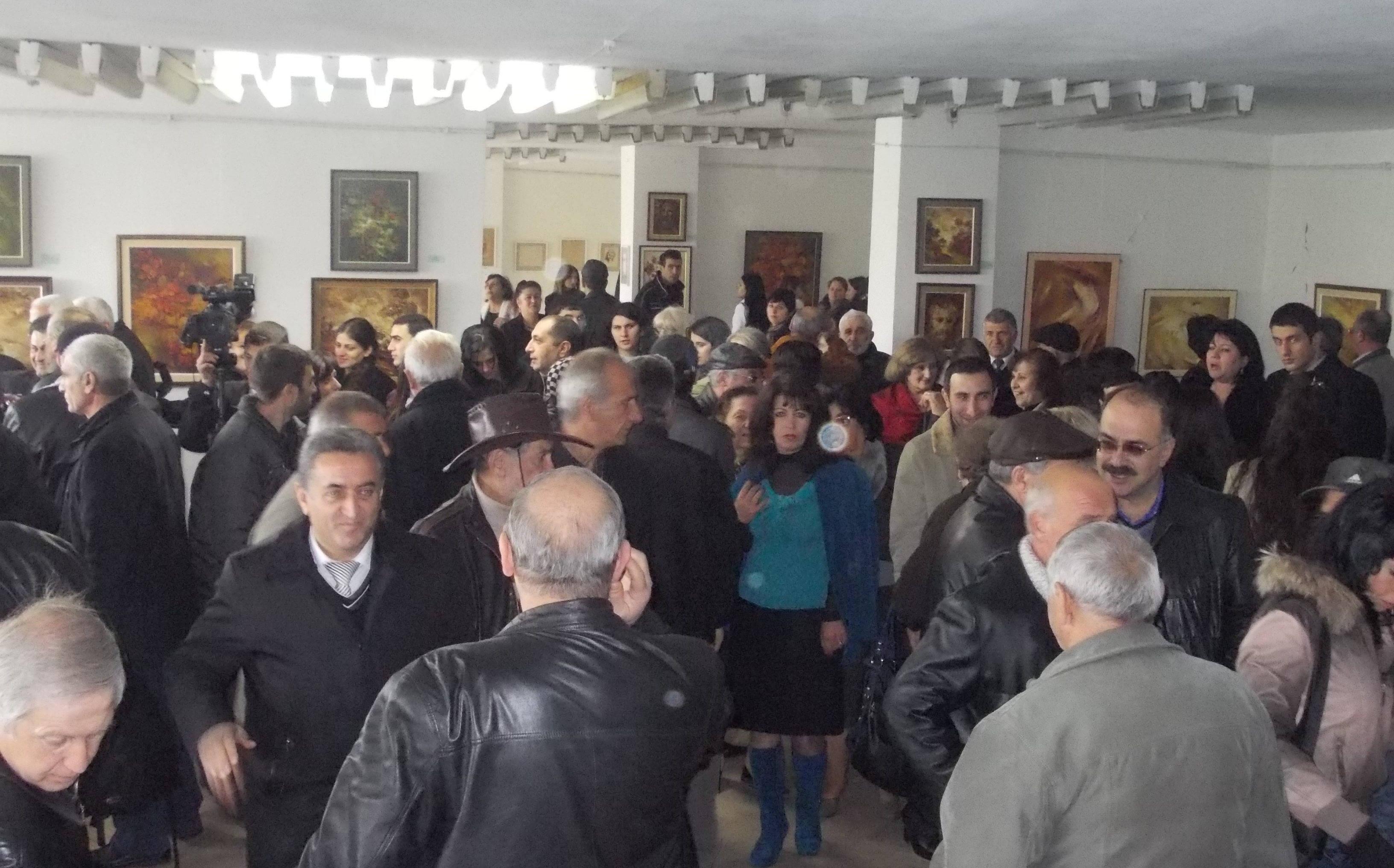 60 -ամյակին նվիրված ցուցահանդես, 2011